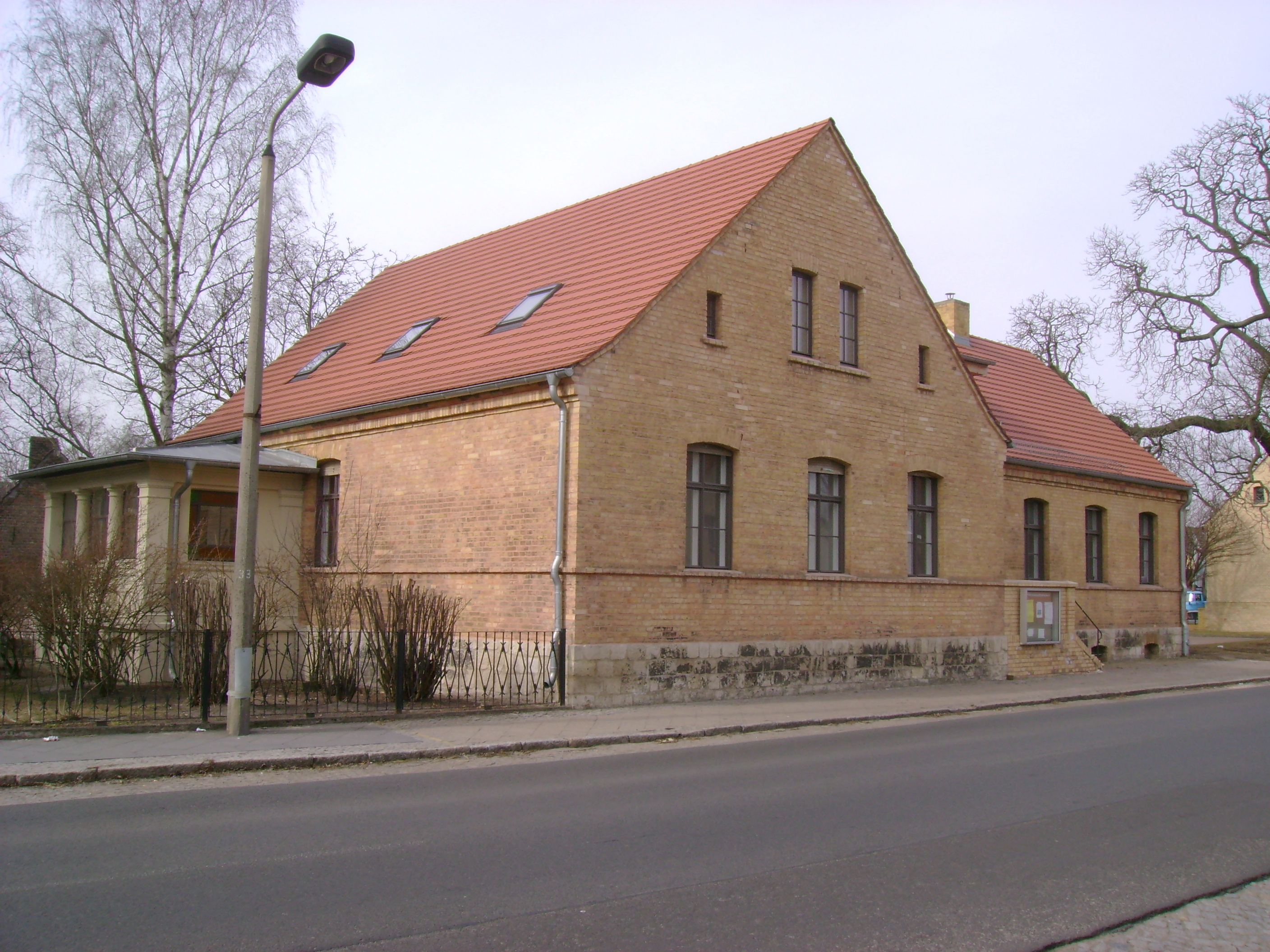 Denkmalgeschütztes evangelisches Pfarrhaus in Velten, Breite Straße 17